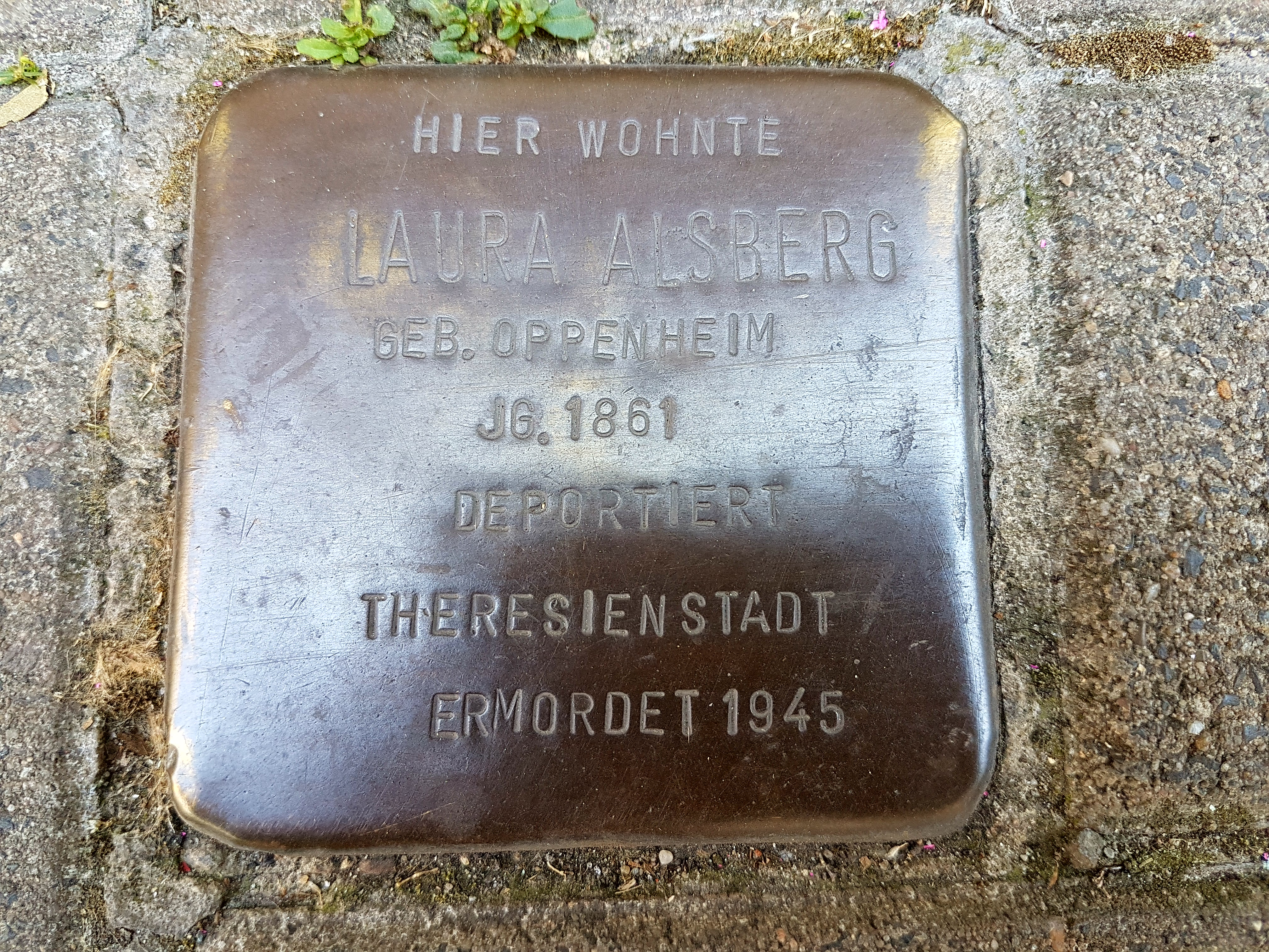 Laura Alsberg Stolperstein Duisburg